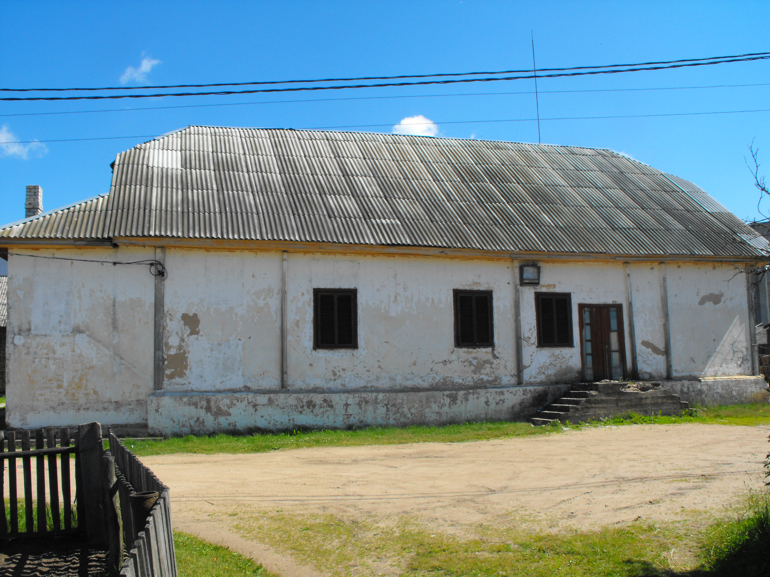 Синагога в Ивенце на улице Школьной